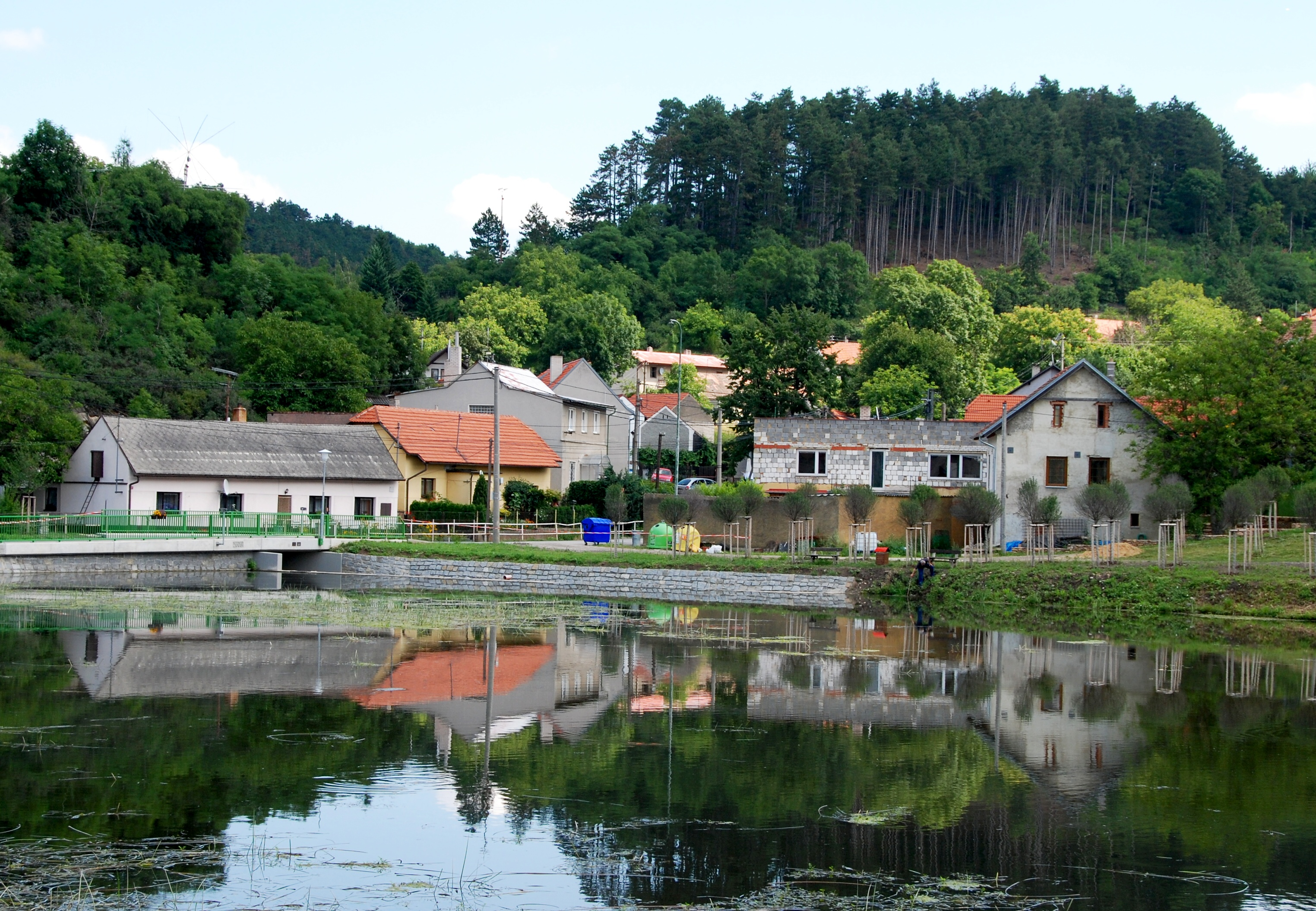 Suchomasty Náves kolem obecního rybníka.